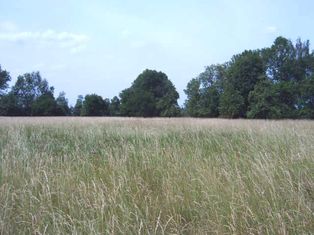 Naturschutzgebiet Barzlin im Spreewald in Deutschland Bild aufgenommen am 24.6.2006 von Olaf Meister